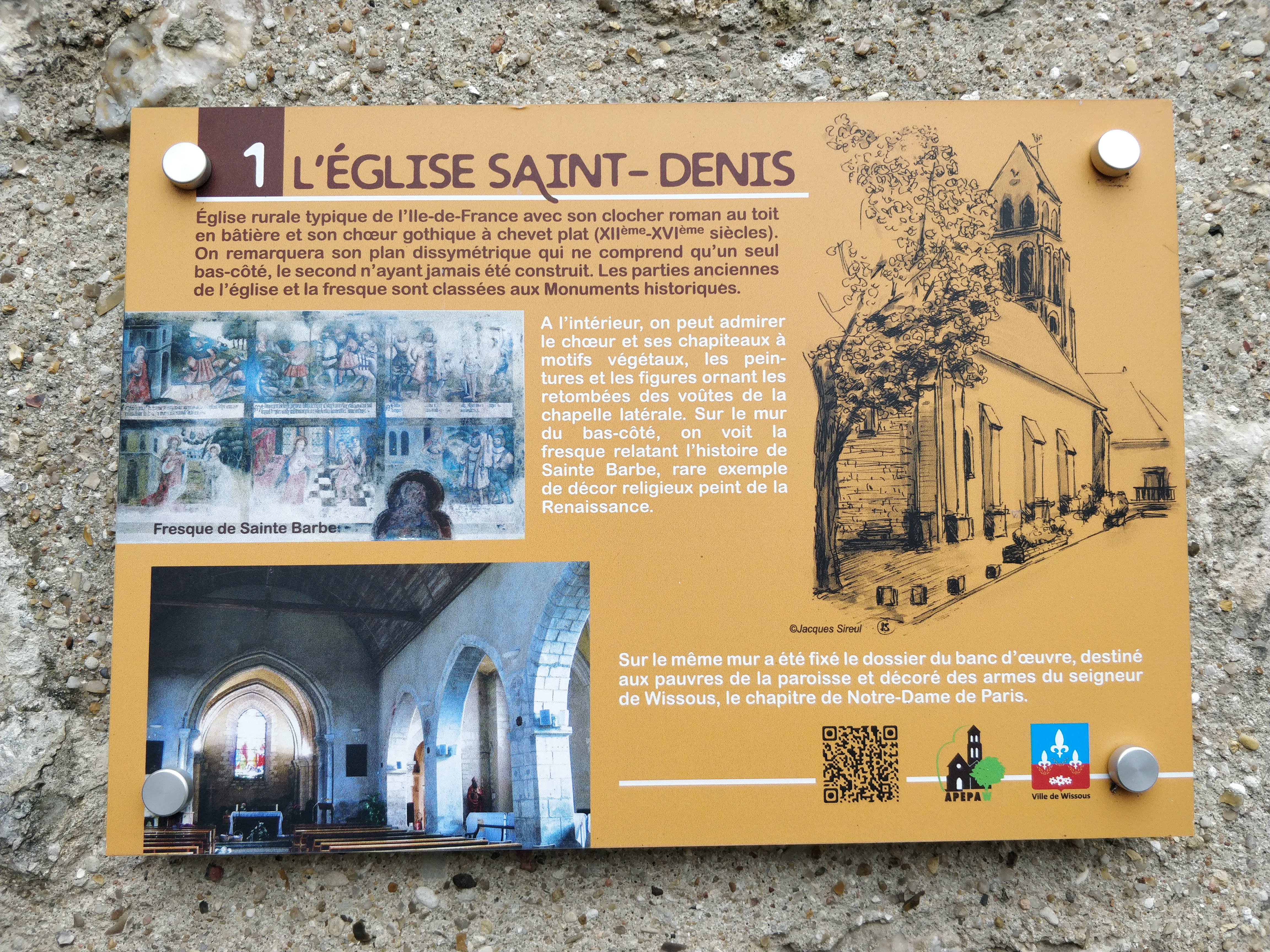 Plaque commémorative de l'Église Saint-Denis de Wissous.